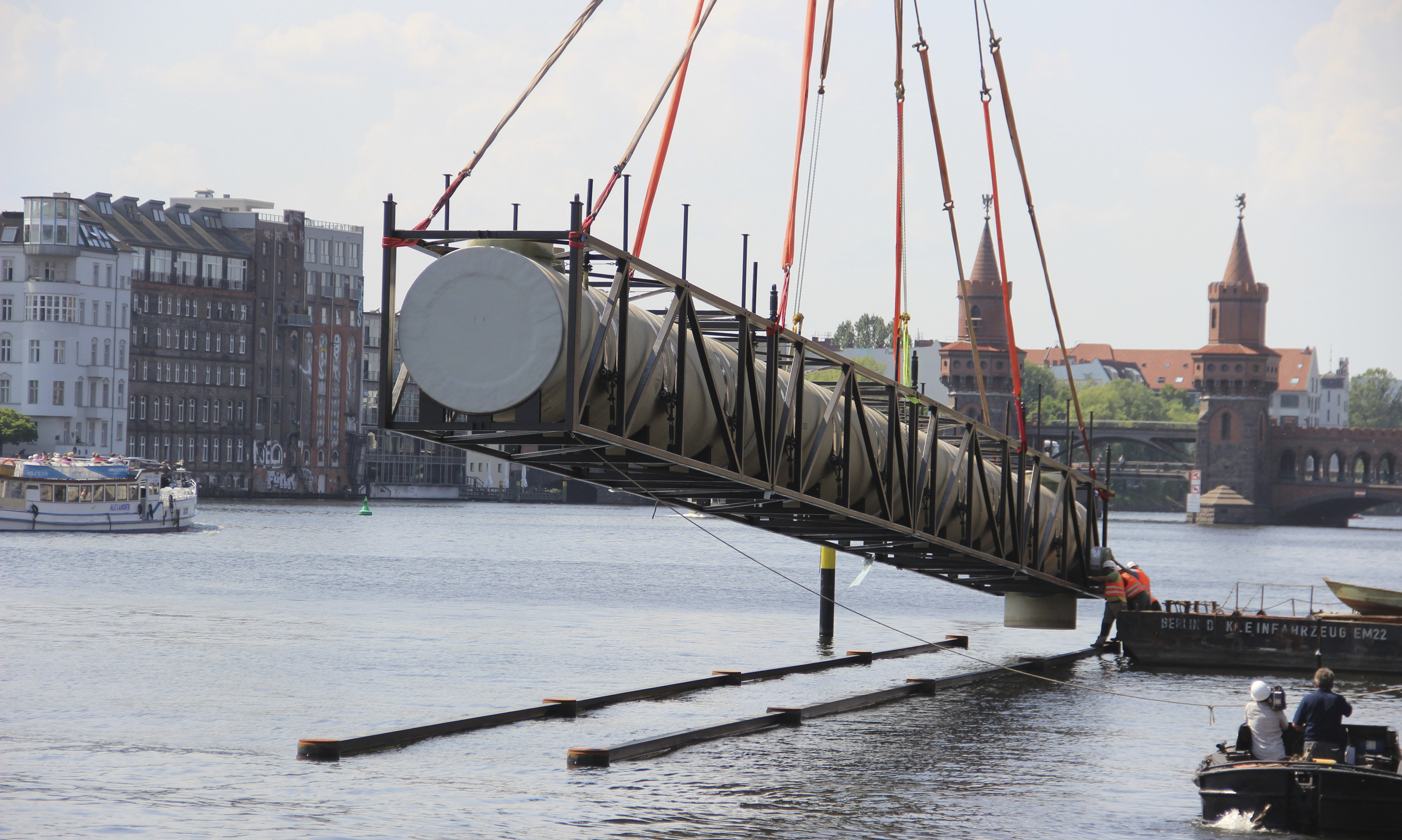 Versenkung einer der Glasfaserrohre, die als Speicherbehälter für die eingeleitenden Abwässer dient.